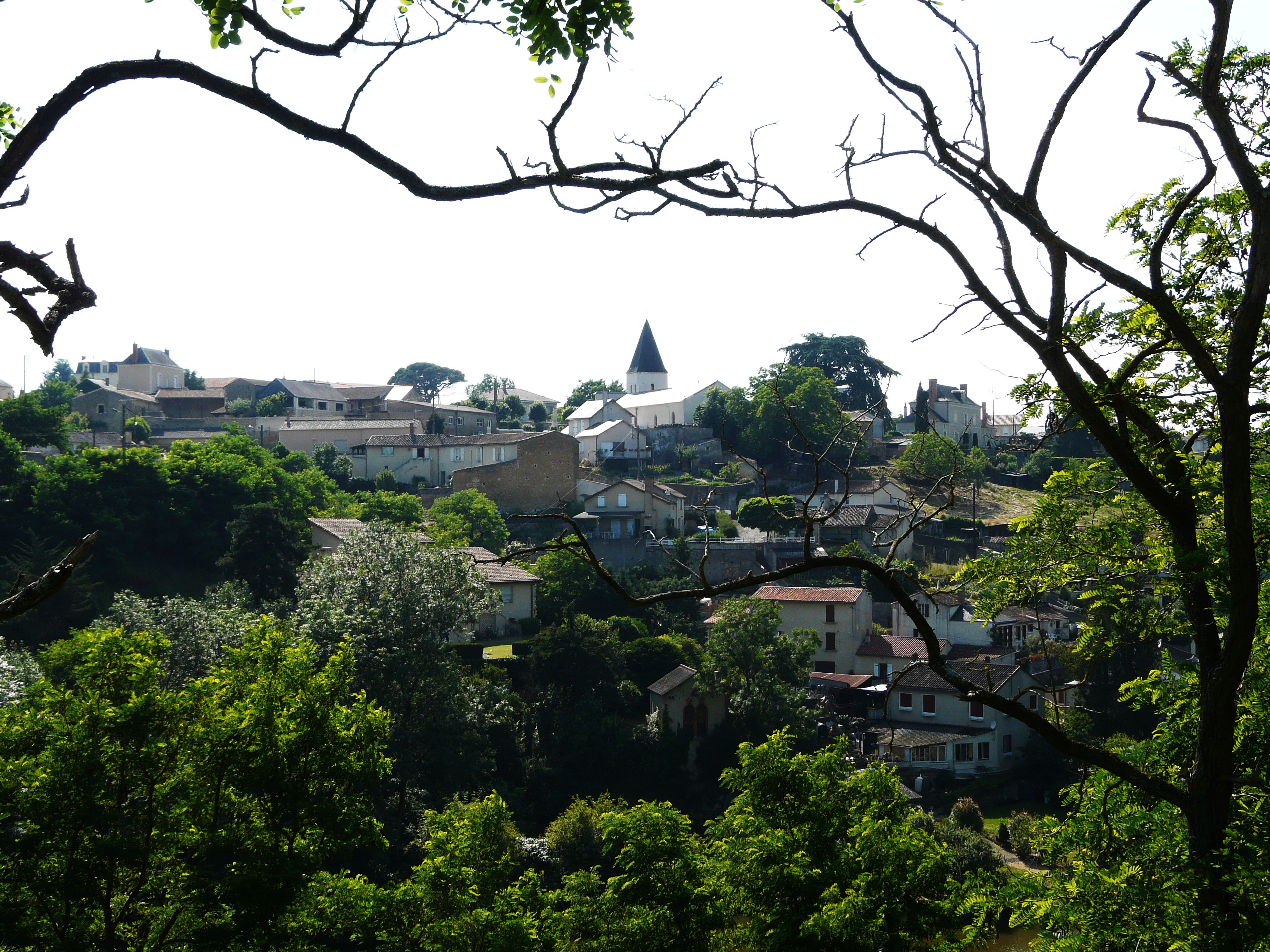 Saint-Jacques-de-Thouars vu depuis Thouars